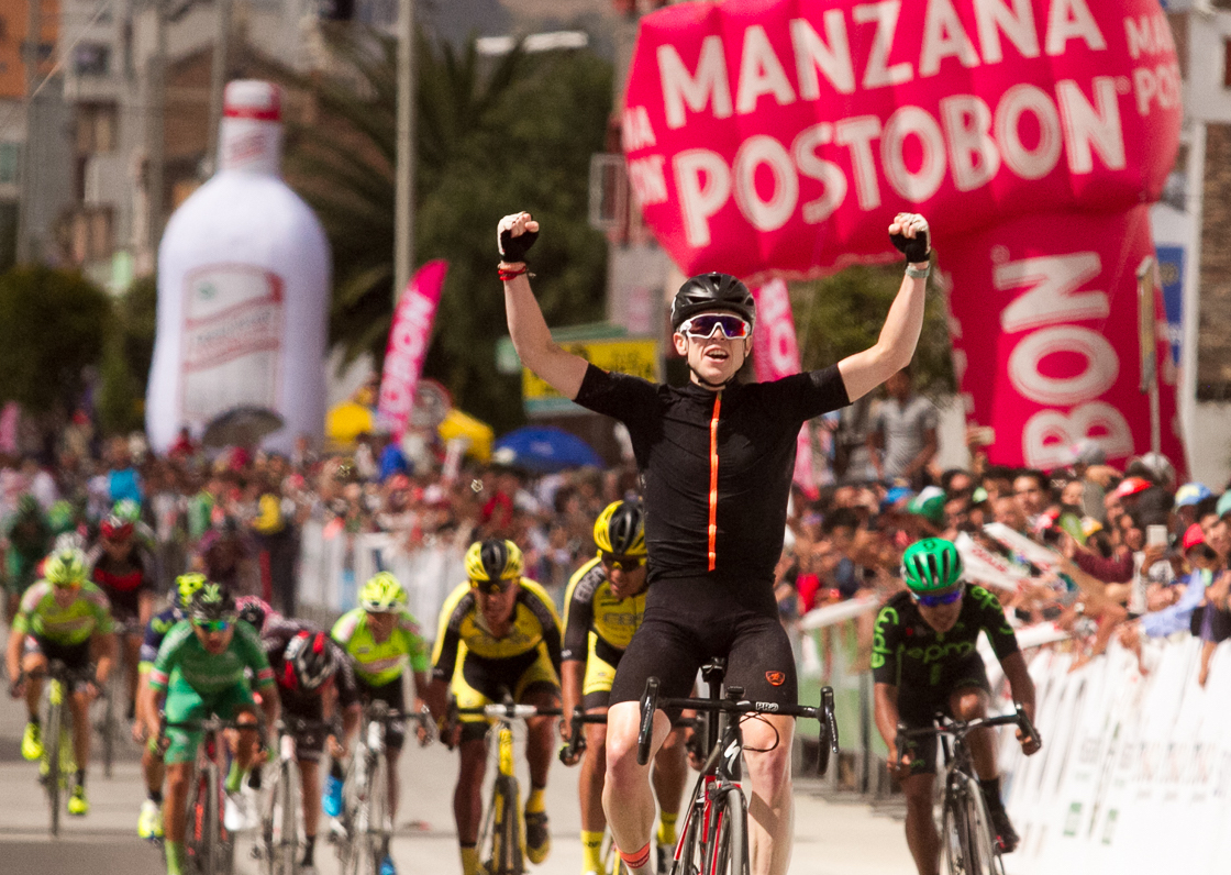 Sprint final. Etapa 6 Vuelta a Colombia 2017 Domingo 6 de agosto de 2017. Socorro - Tunja 237 Kms